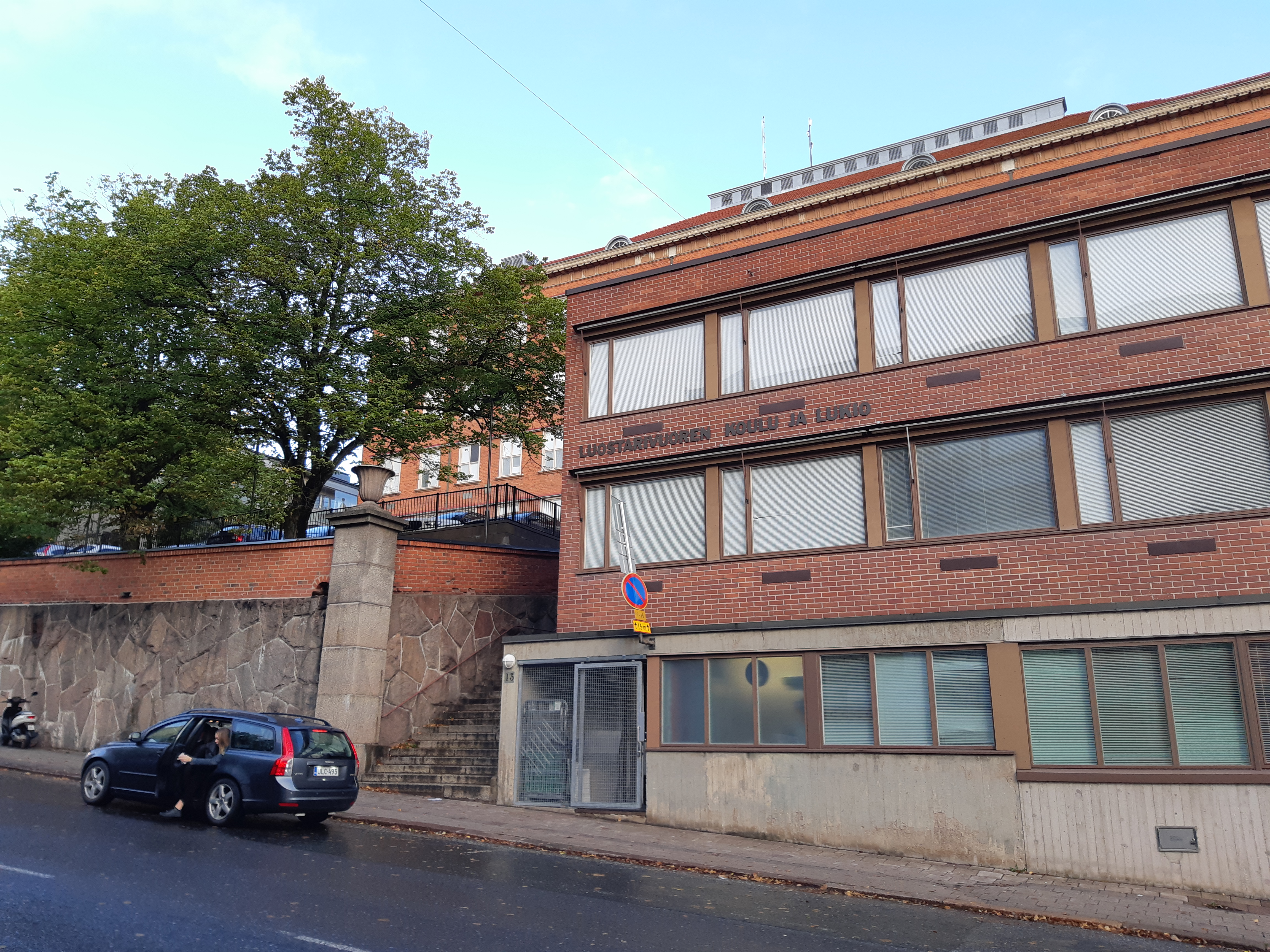 Lisärakennus. Arkkitehti Aarne Ehojoki 1967.